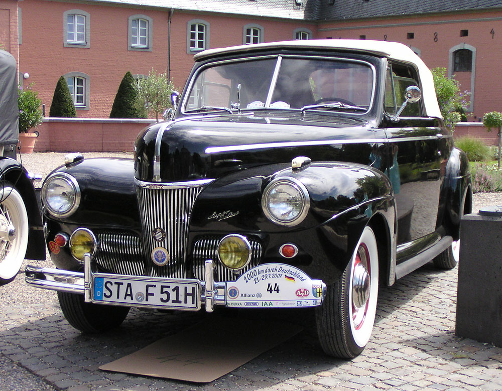 Ford V8 Super Deluxe Cabrio 1941 at 2000 km durch Deutschland